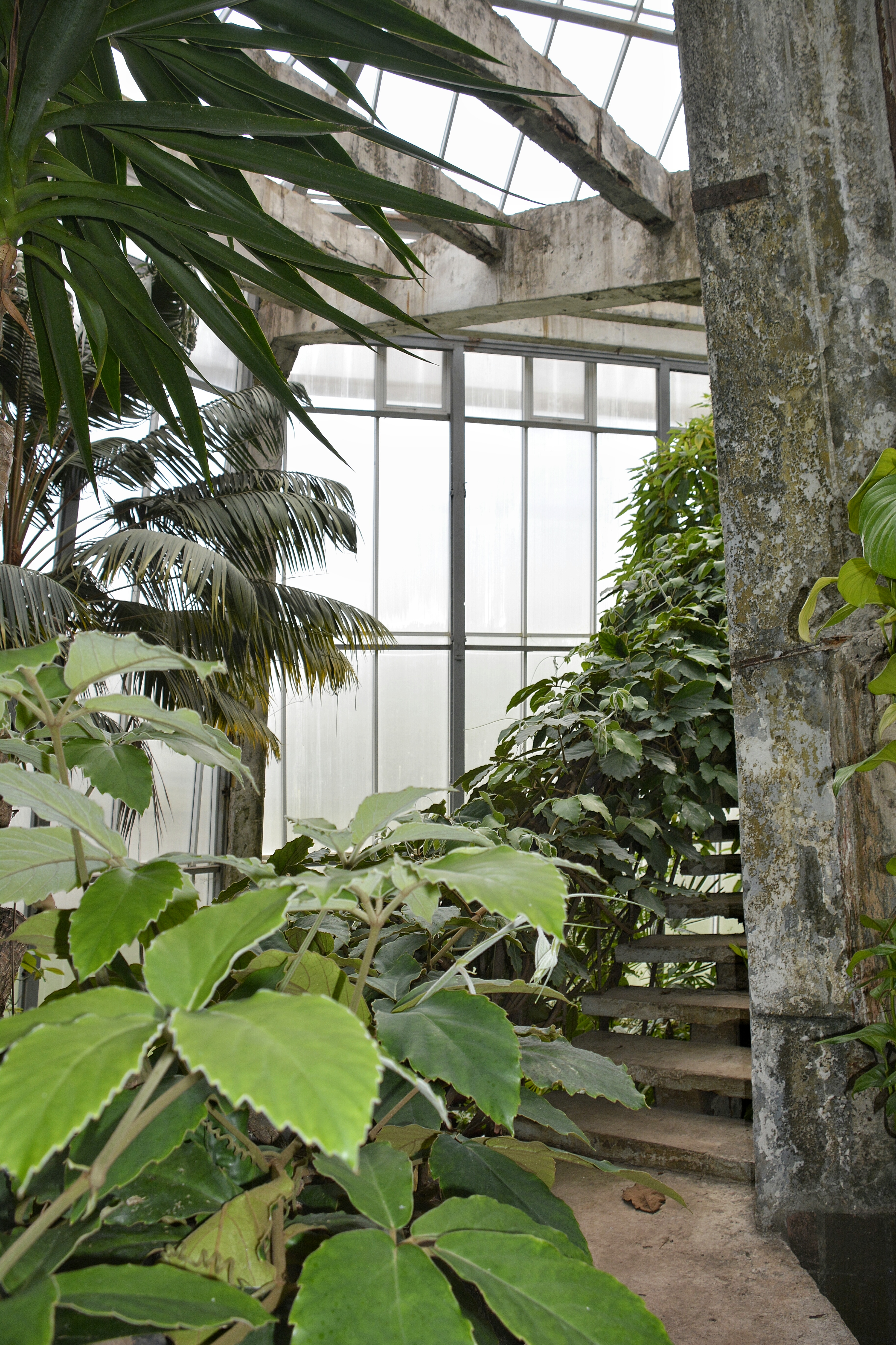 Чернівецький, м. Чернівці, вул. Федьковича, 11